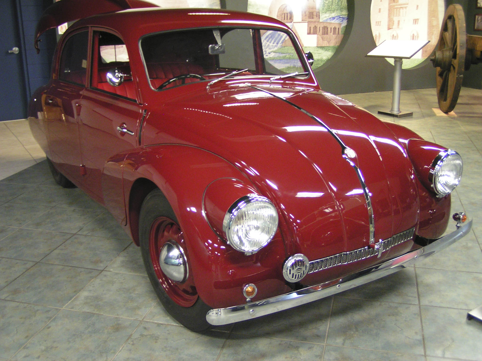 Tatra T97Tatra T97